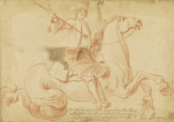 Hippokamp (nach dem Palais Jauch in Solec bei warschau)